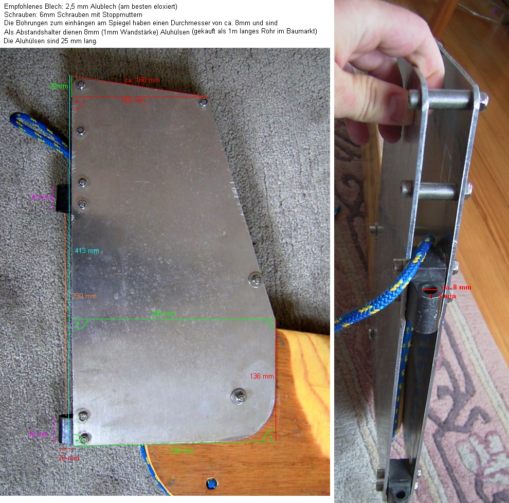 Ruderkopf einer Piaf mit Maßen (geeignet zum Nachbau)